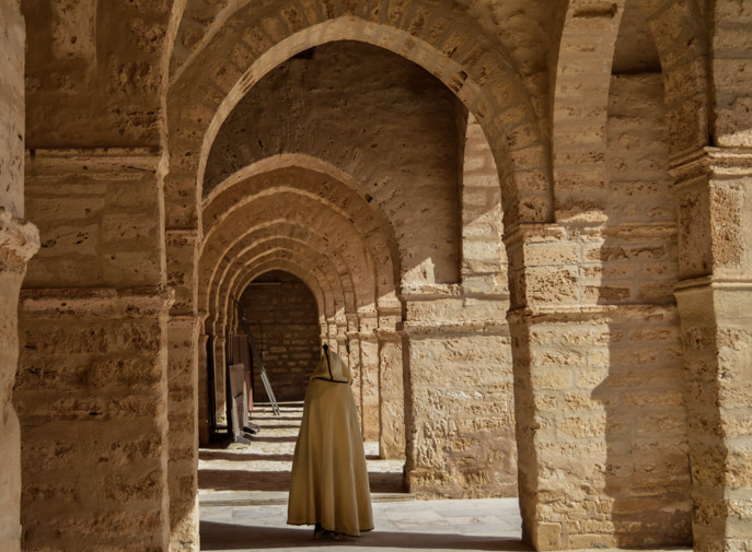 Grande mosquée et son ancien minaret